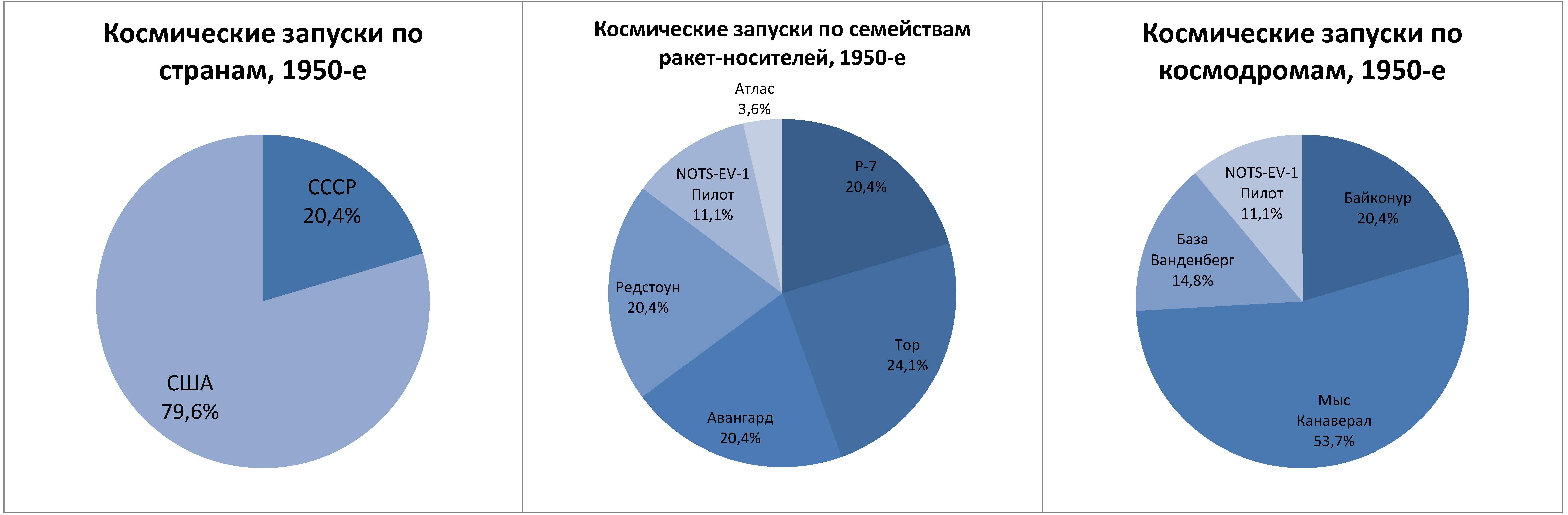 Диаграммы соотношение количества космических запусков в разрезе стран, ракет-носителей и космодромов в 1950-е годы. Диаграммы построены на основании АИ используемых в статье Список космических запусков и в соответствии с используемой в них методологией.